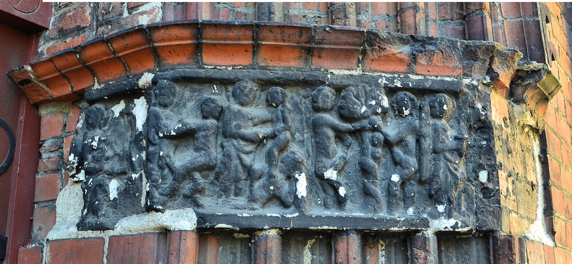 Kościół Mariacki w Stargardzie Szczecińskim